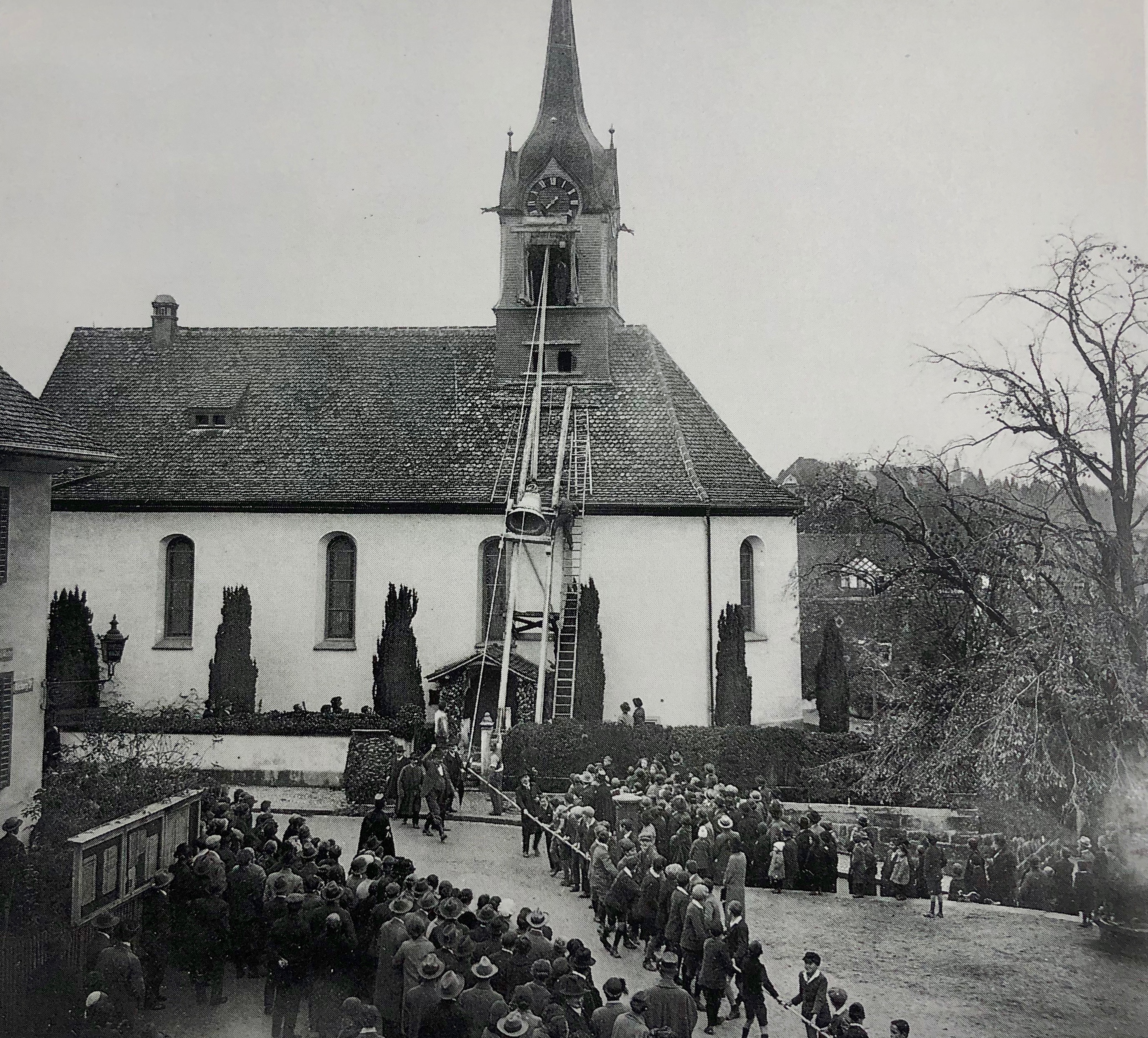 Alte Kirche Wollishofen, Glockenaufzug des neuen Geläutes